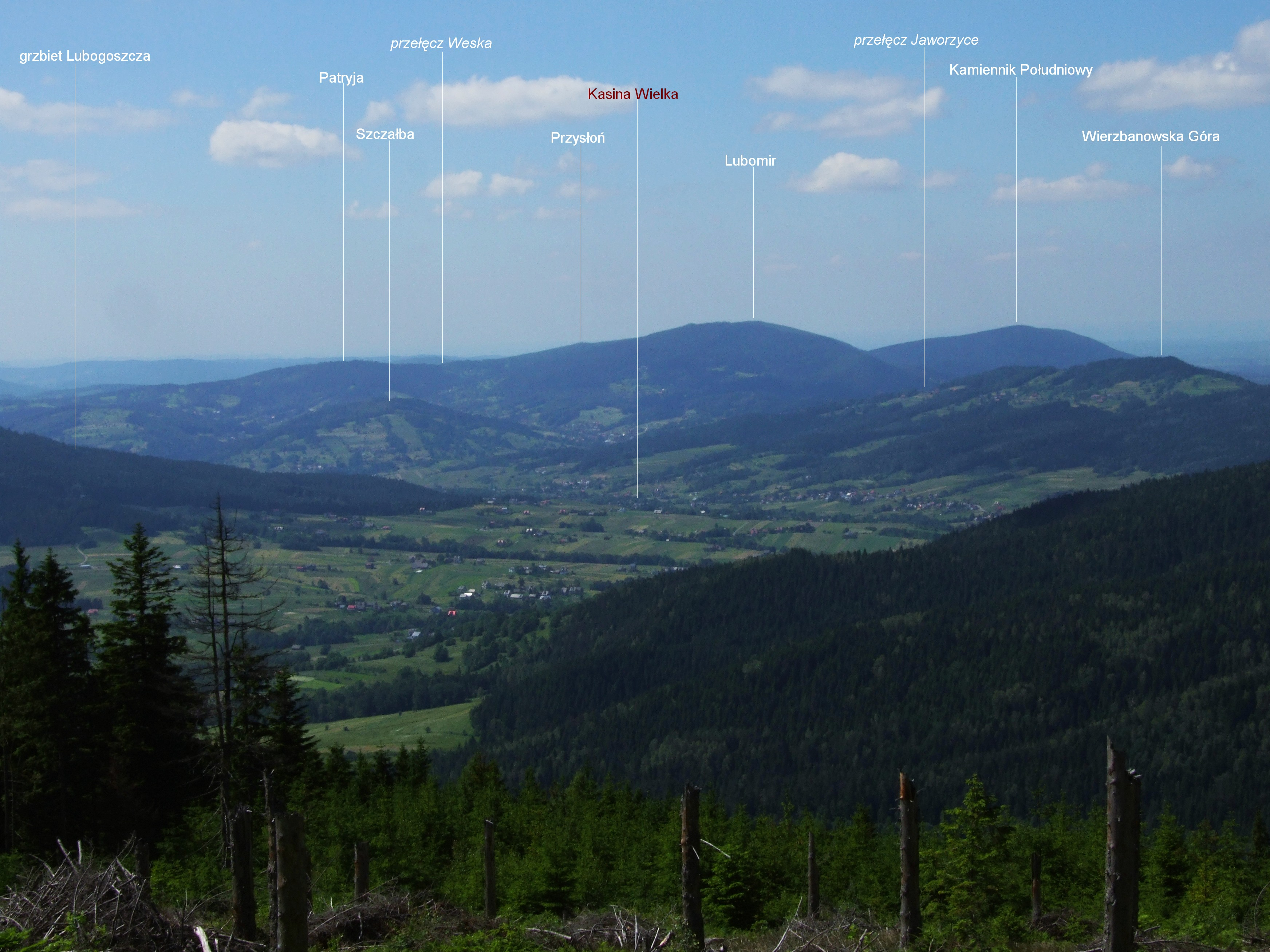 Widok z zachodnich stoków Ćwilina